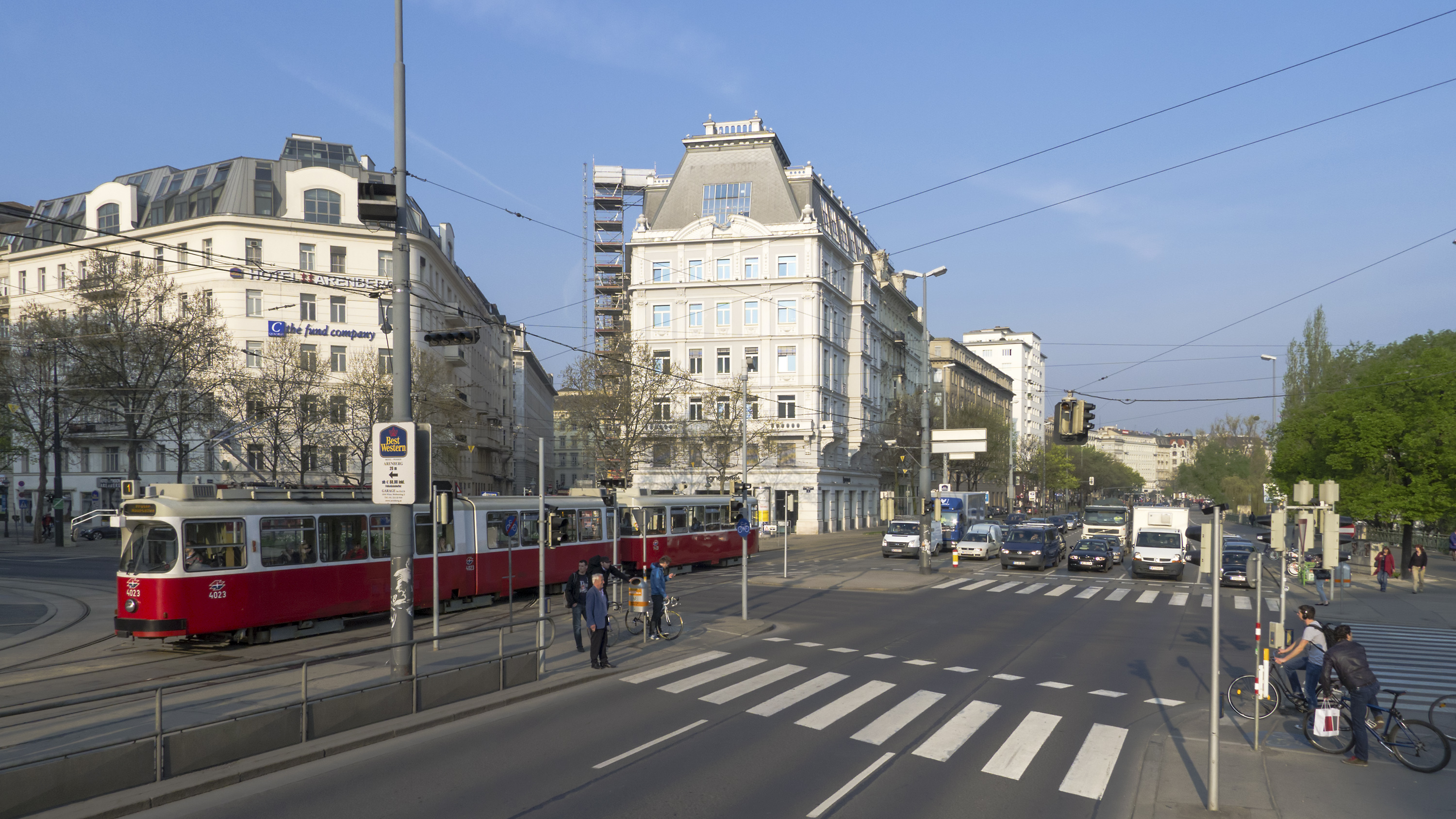 Julius-Raab-Platz in Wien 1 bei der Uraniastraße Richtung Südwesten